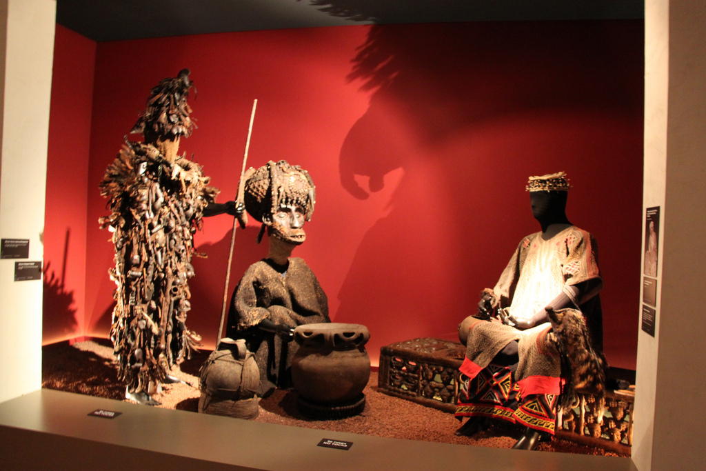 Detalle de la exposición Reino de Oku, que pertenece a la Fundación Alberto Jiménez-Arellano Alonso. Está expuesta en la Sala San Ambrosio del Palacio Santa Cruz de Valladolid